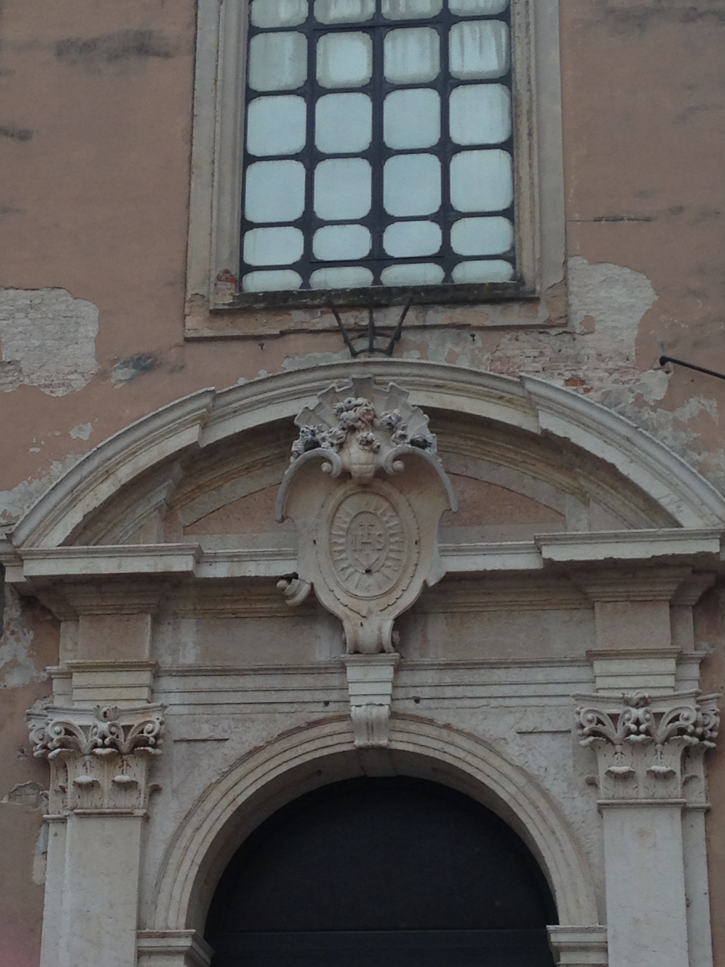 Dettaglio dello stemma della Compagnia di Gesù: un disco raggiate all'interno del quale sono presenti le lettere IHS, il monogramma di Cristo.